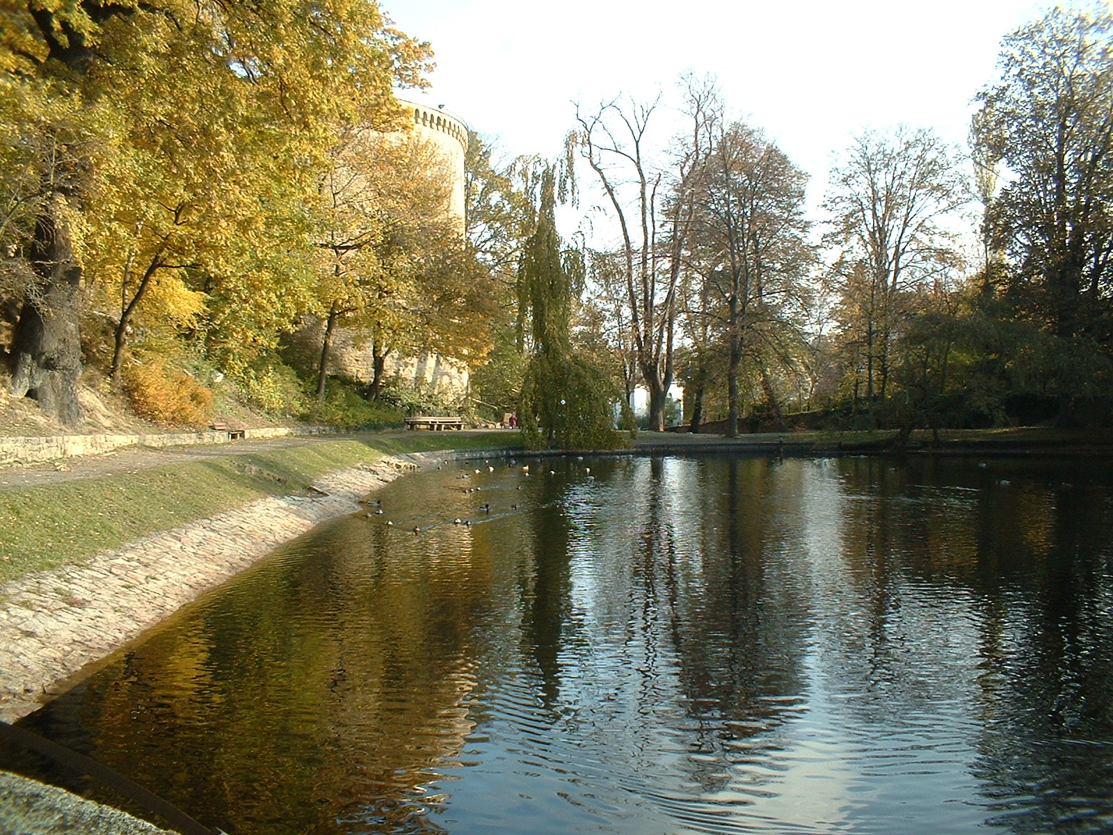 Zwinger und Kahnteich